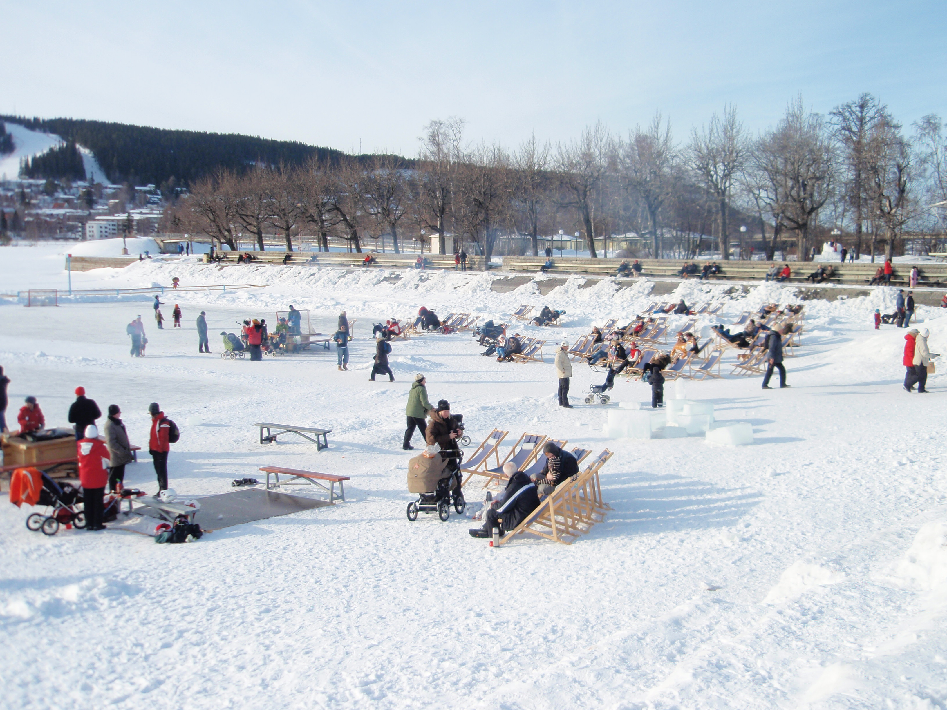 Badhusparken in Östersund